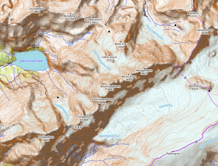 carte réalisée sur umap This map may be incomplete, and may contain errors. Don't rely solely on it for navigation.